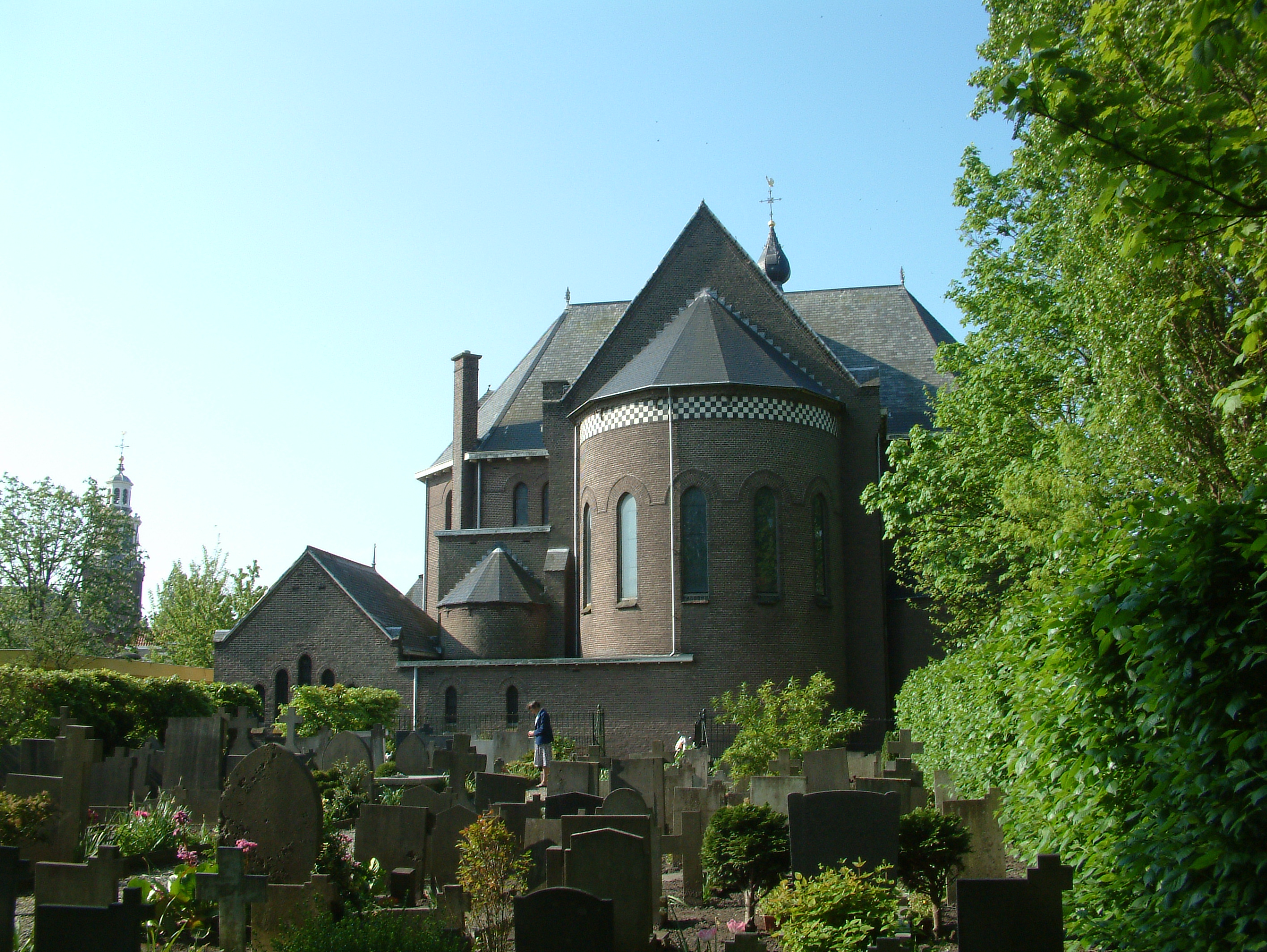 H. Nicolaaskerk Zoetermeer Exterieur achterkant